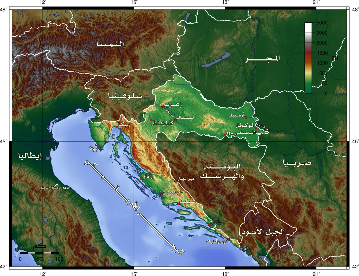 خريطة كرواتيا الطبوغررافية